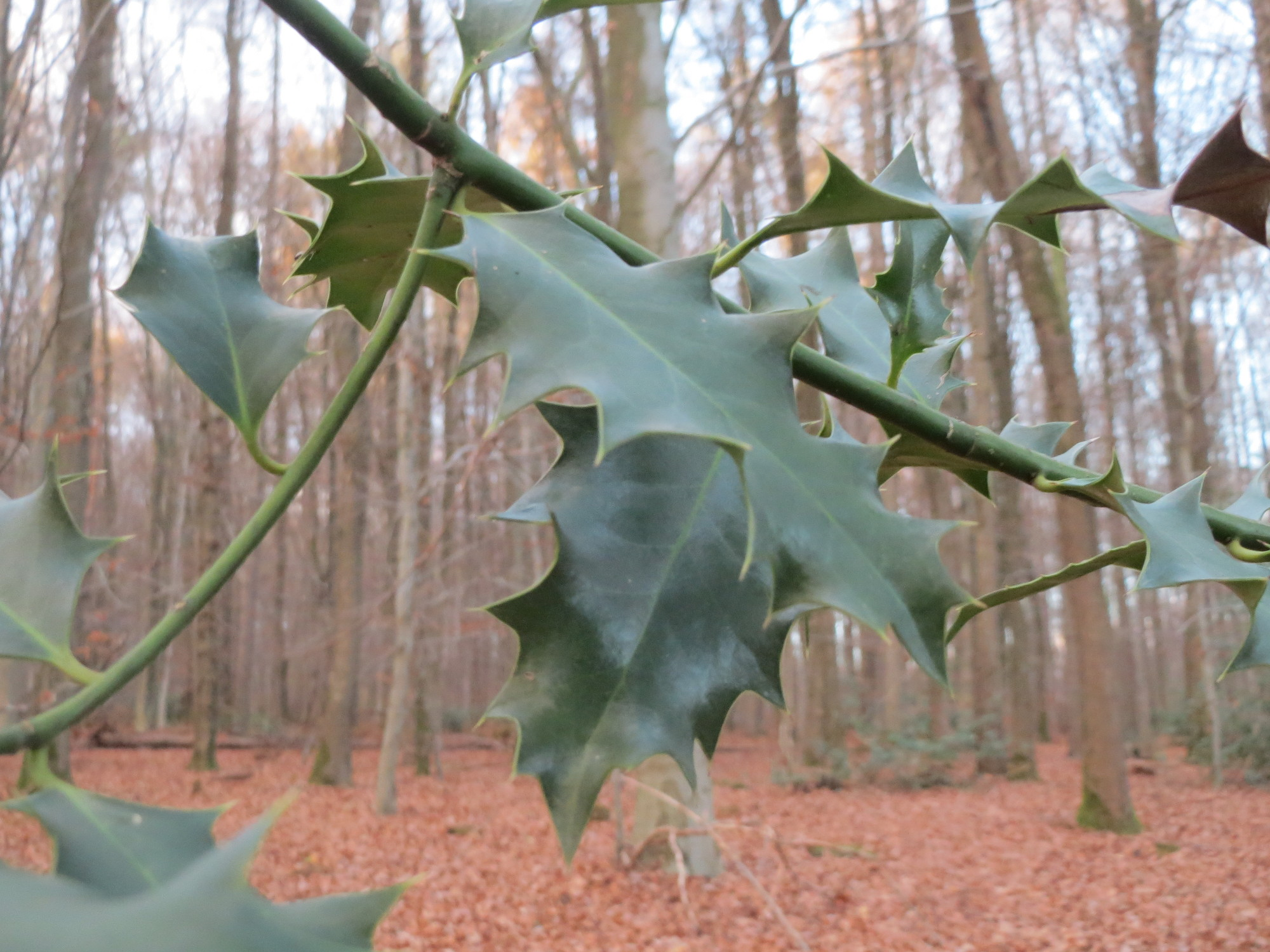 Europäische Stechpalme (Ilex aquifolium) im St. Johanner Stadtwald